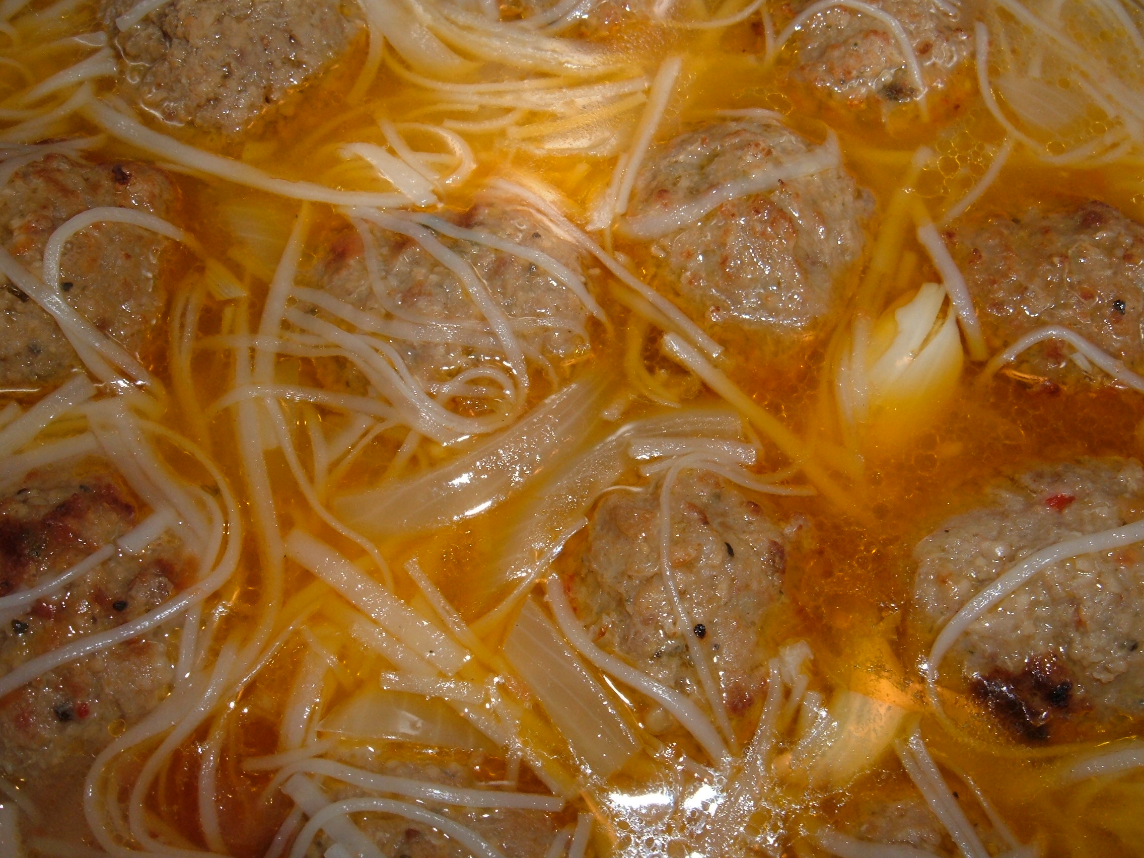 Filipino Almondigas